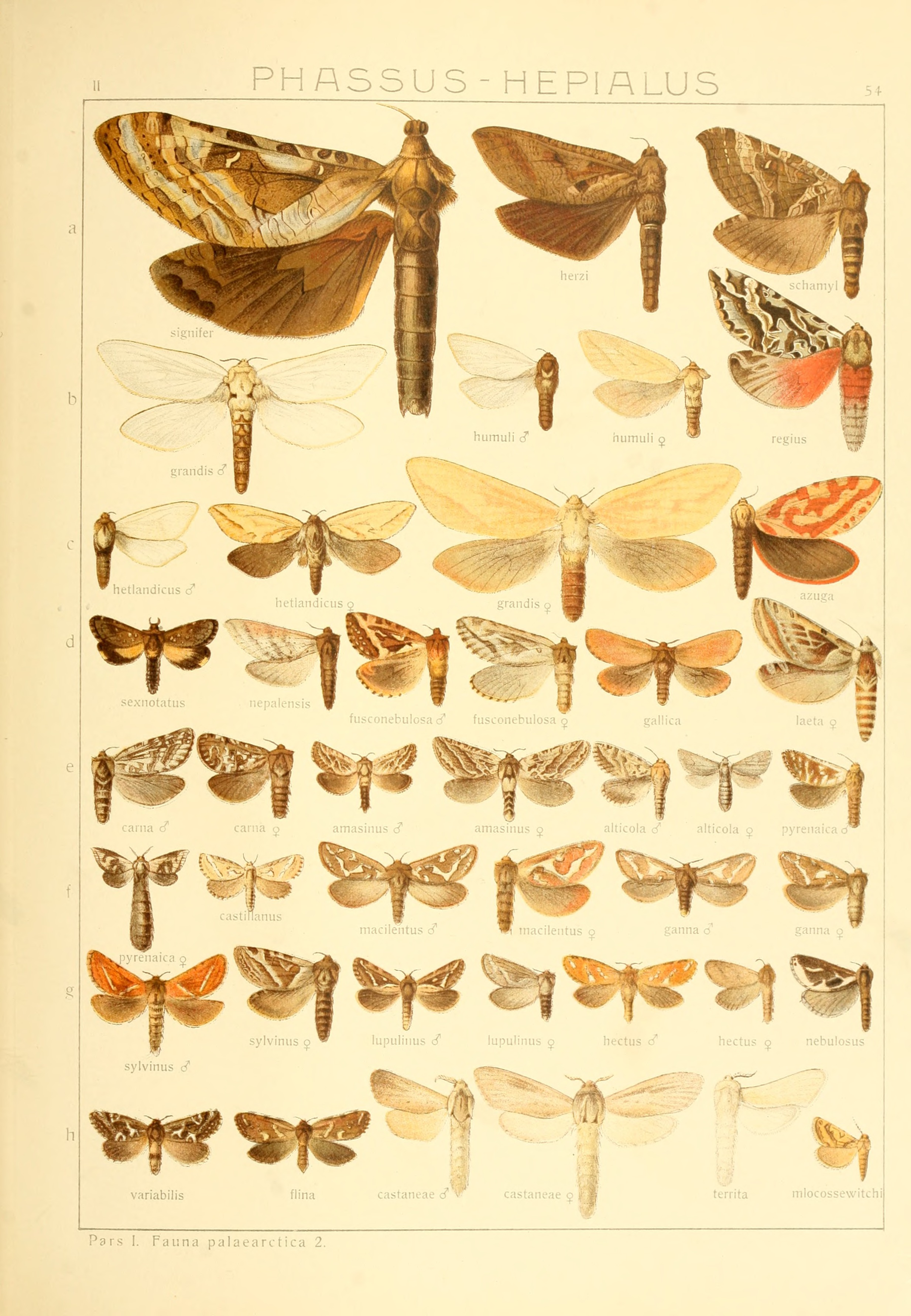 Plate from Seitz,1912- 1913 A. Ed. Die Großschmetterlinge der Erde, Verlag Alfred Kernen, Stuttgart Band 2: Abt. 1, Die Großschmetterlinge des palaearktischen Faunengebietes, Die palaearktischen Spinner und Schwärmer, 1912- 1913 The Macrolepidoptera of the world : a systematic account of all the known Macrolepidoptera Volume 2 (1912-1916) text online read text See The Global Lepidoptera Names Index for valid names